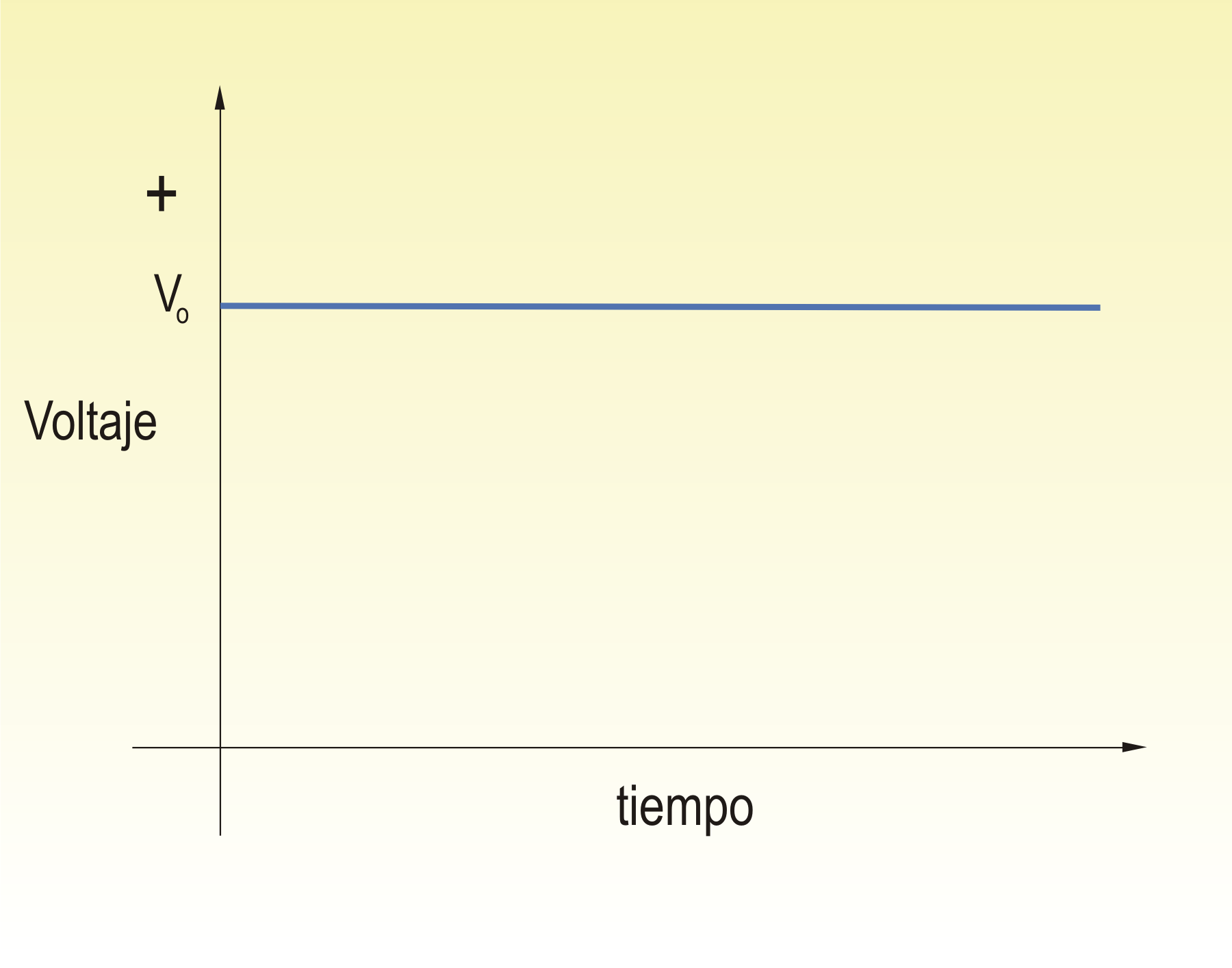 representación gráfica del voltaje frente al tiempo para una corriente continua